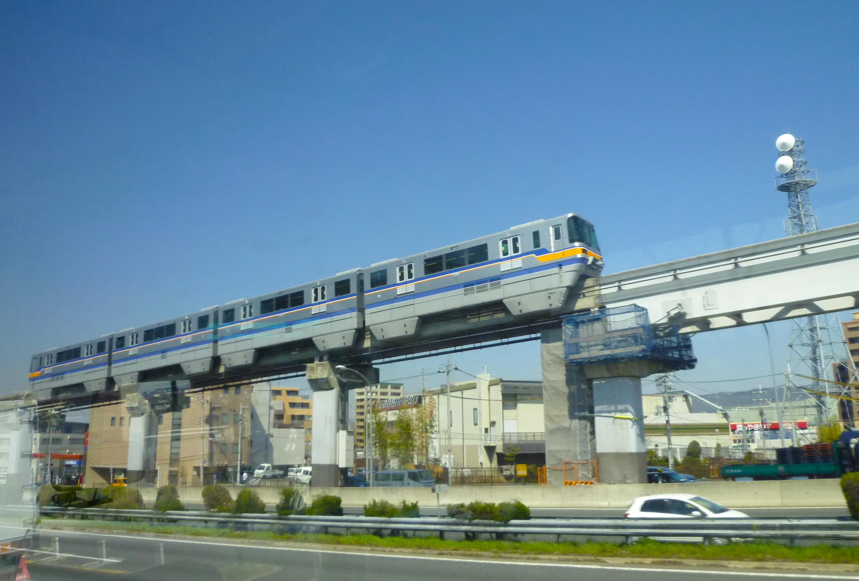 大阪高速鉄道（大阪モノレール）に在籍する新型車両、2000系の最新車両 (Osaka Monorail new 2000 series)